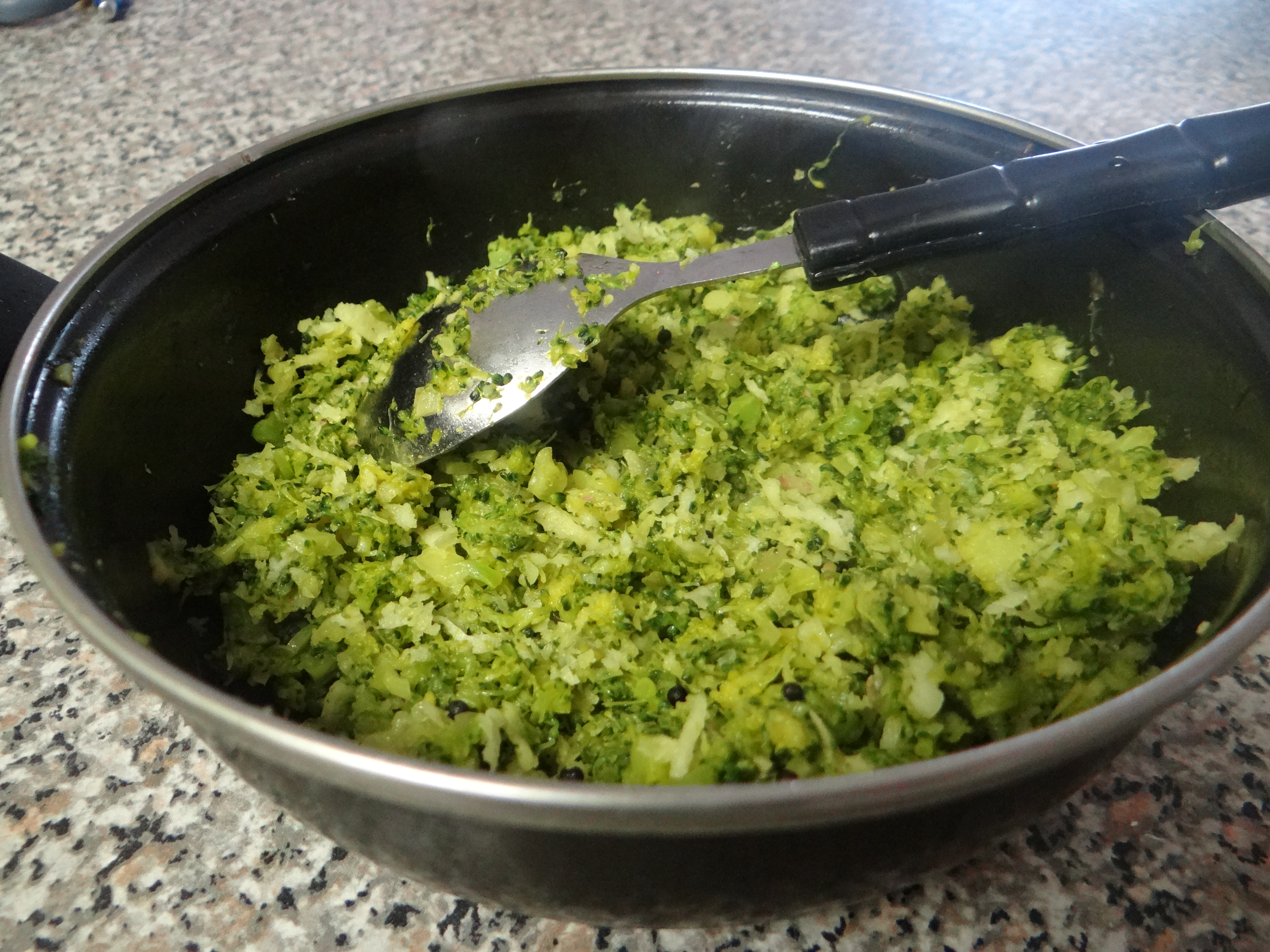 ബ്രോക്കോളി ഉപയോഗിച്ച് ഉണ്ടാക്കിയ തോരൻ, ഒരു പരീക്ഷണാടിസ്ഥാനത്തില്‍ ഉണ്ടാക്കി നോക്കി, പിന്നീട് അത് ശീലമാക്കി